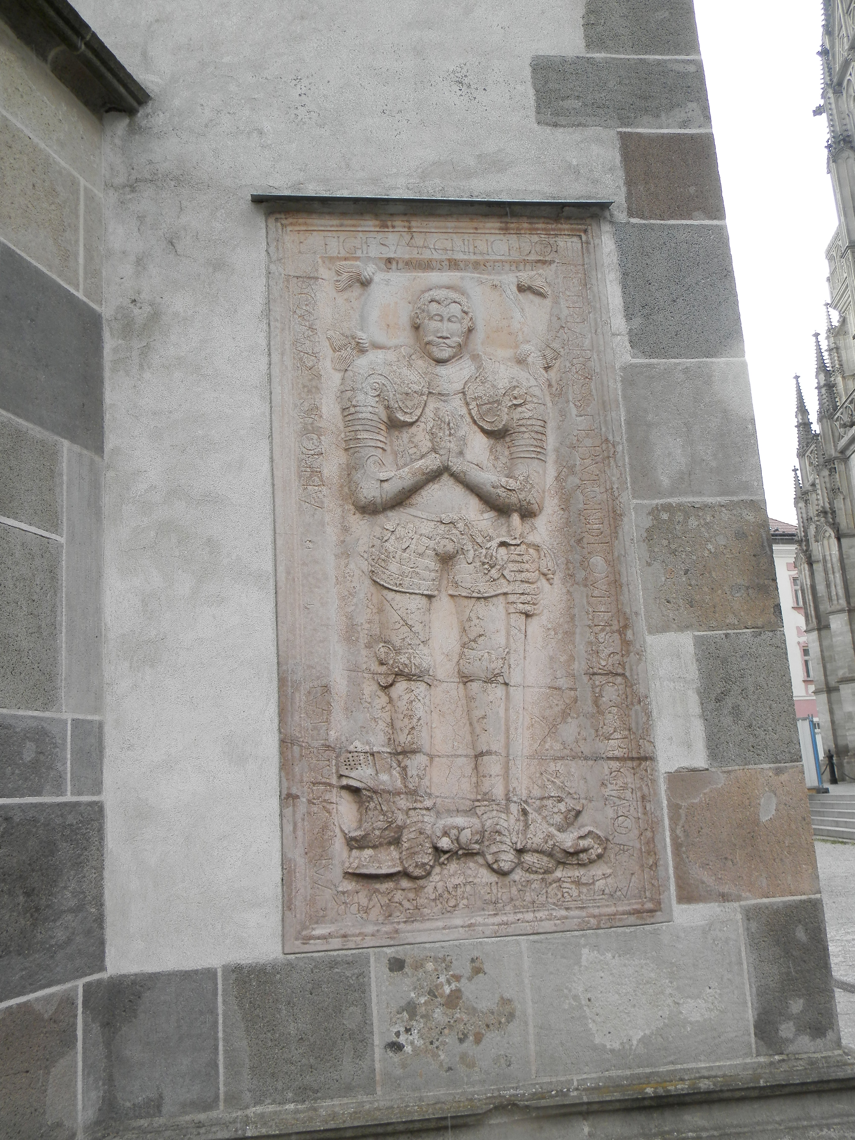 Epitaf Petra Roussela z roku 1577